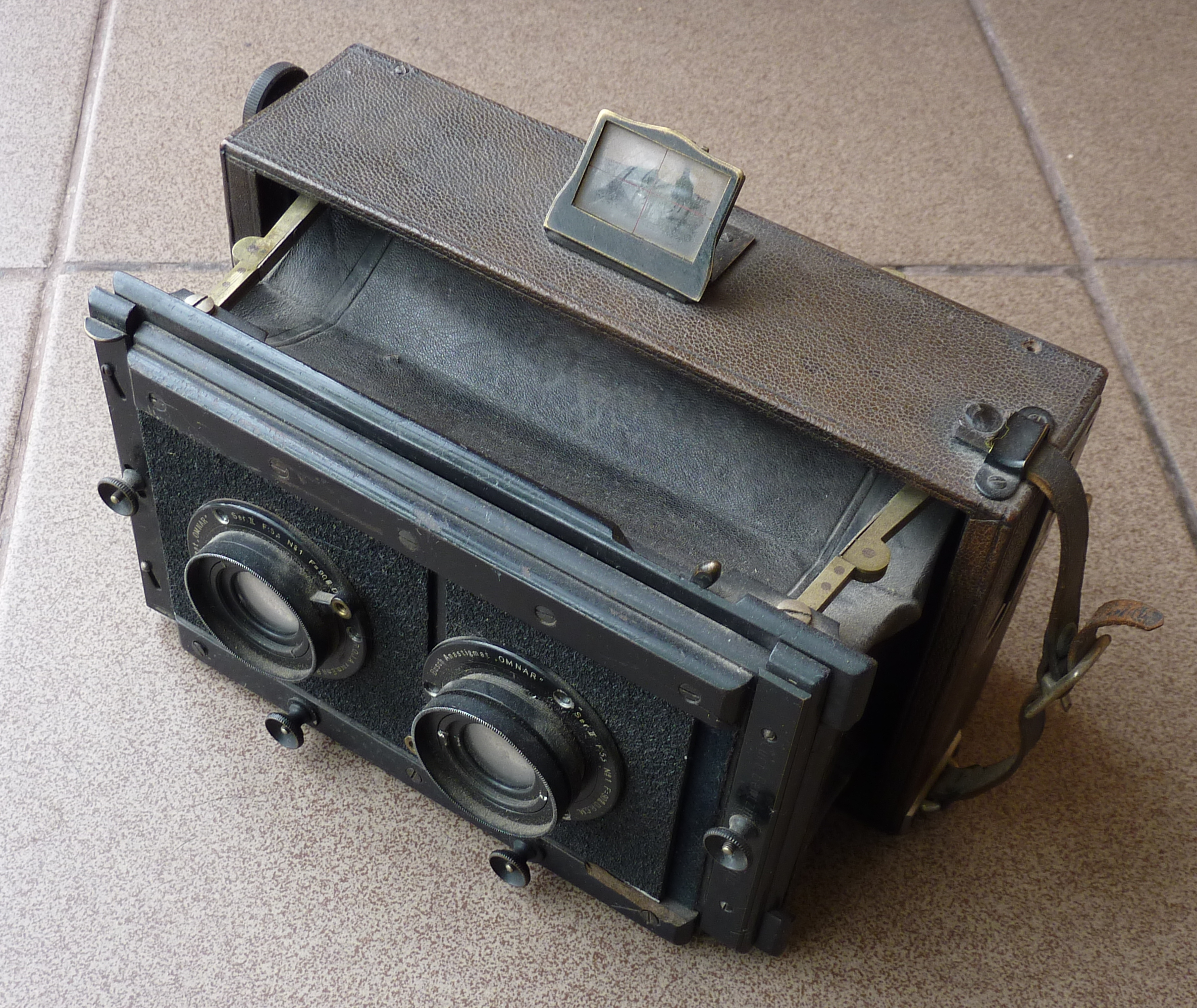 Aparat fotograficzny stereoskopowy na płyty szklane firmy Curt Bentzin Görlitz